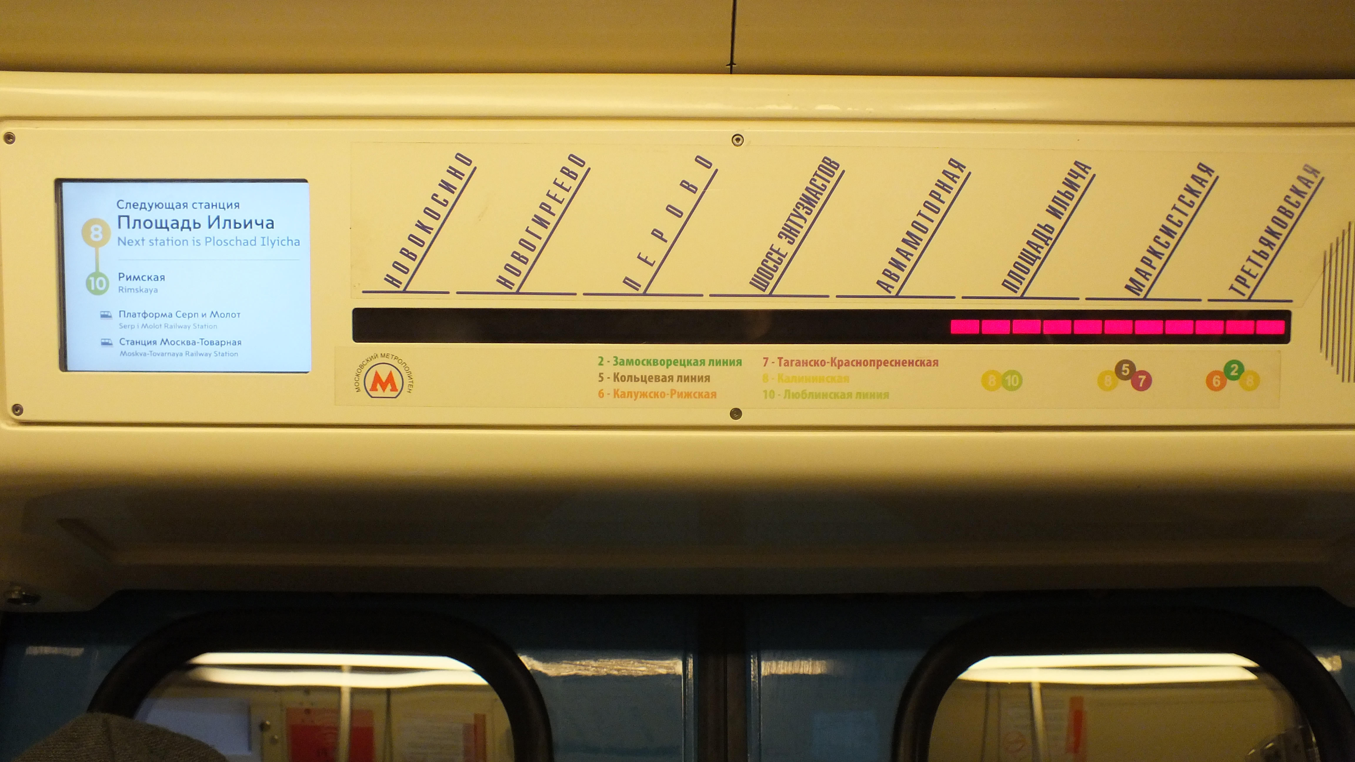 Схема Калининского радиуса Калининско-Солнцевской линии в вагоне метро.